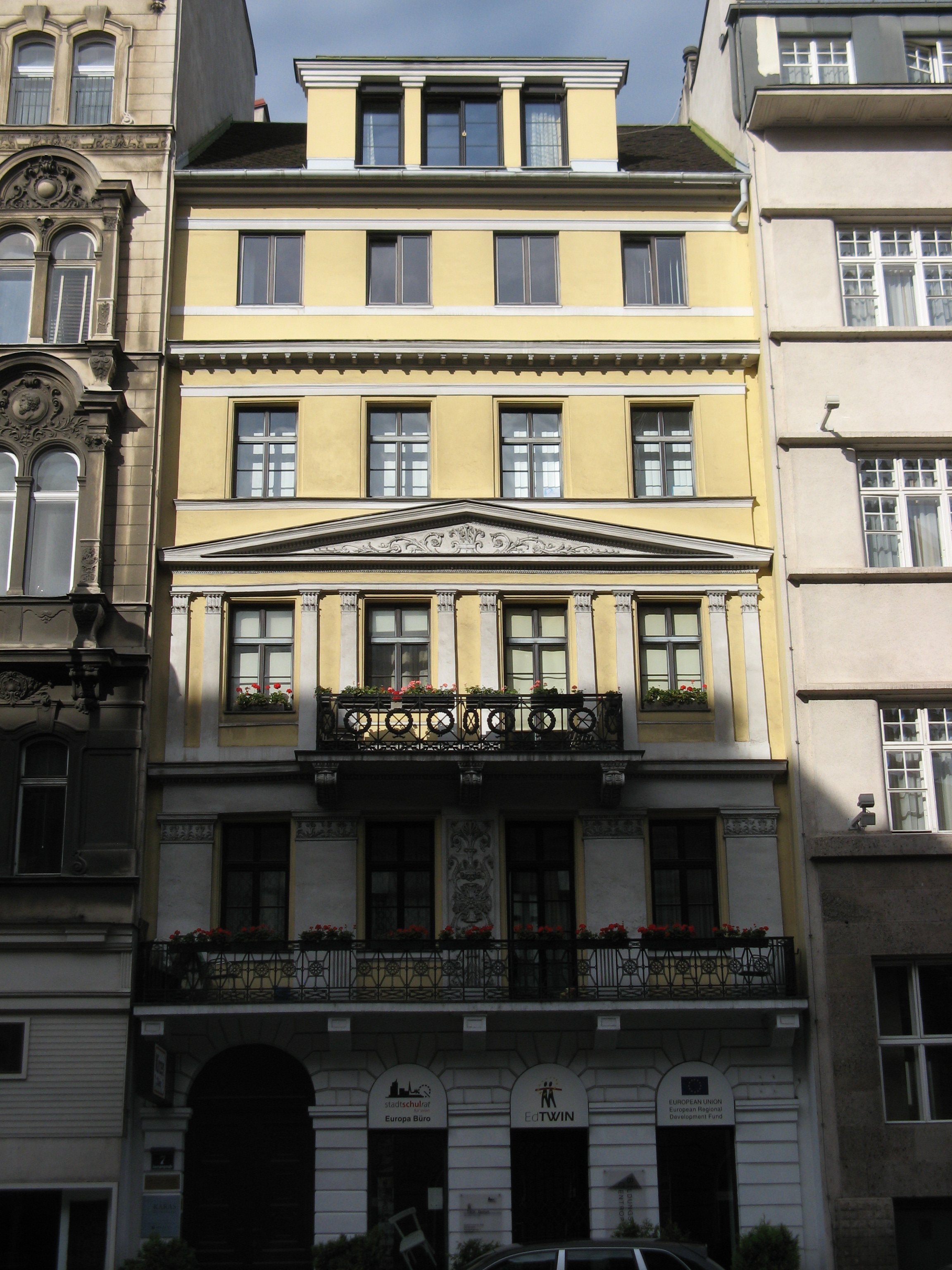 Zur kleinen Mariahilf (1837) von Karl Högel, Auerspergstraße 7, Wien-Josefstadt